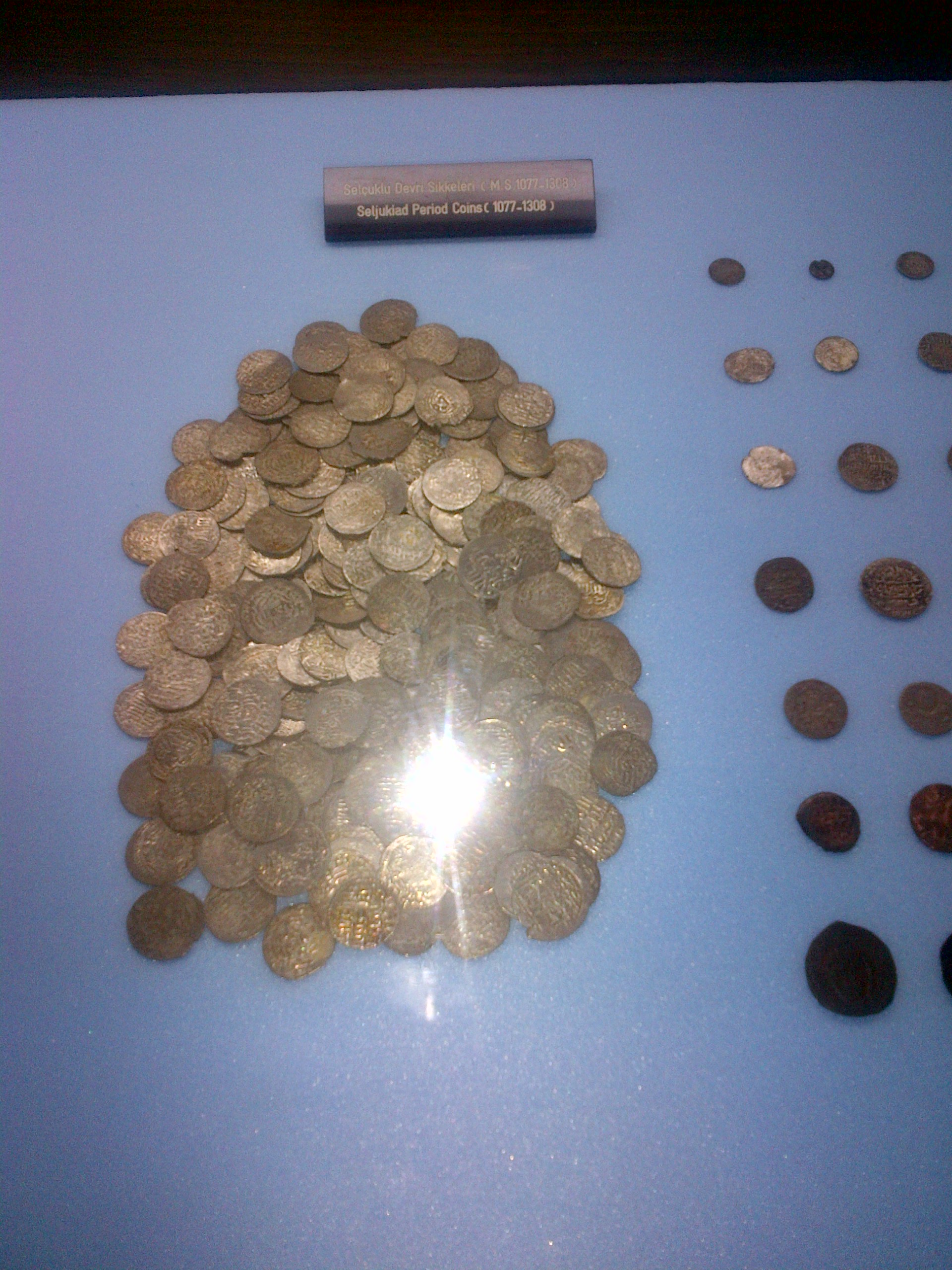 Monedas del Imperio selyucida en el Museo de Arqueologia de Samsun.